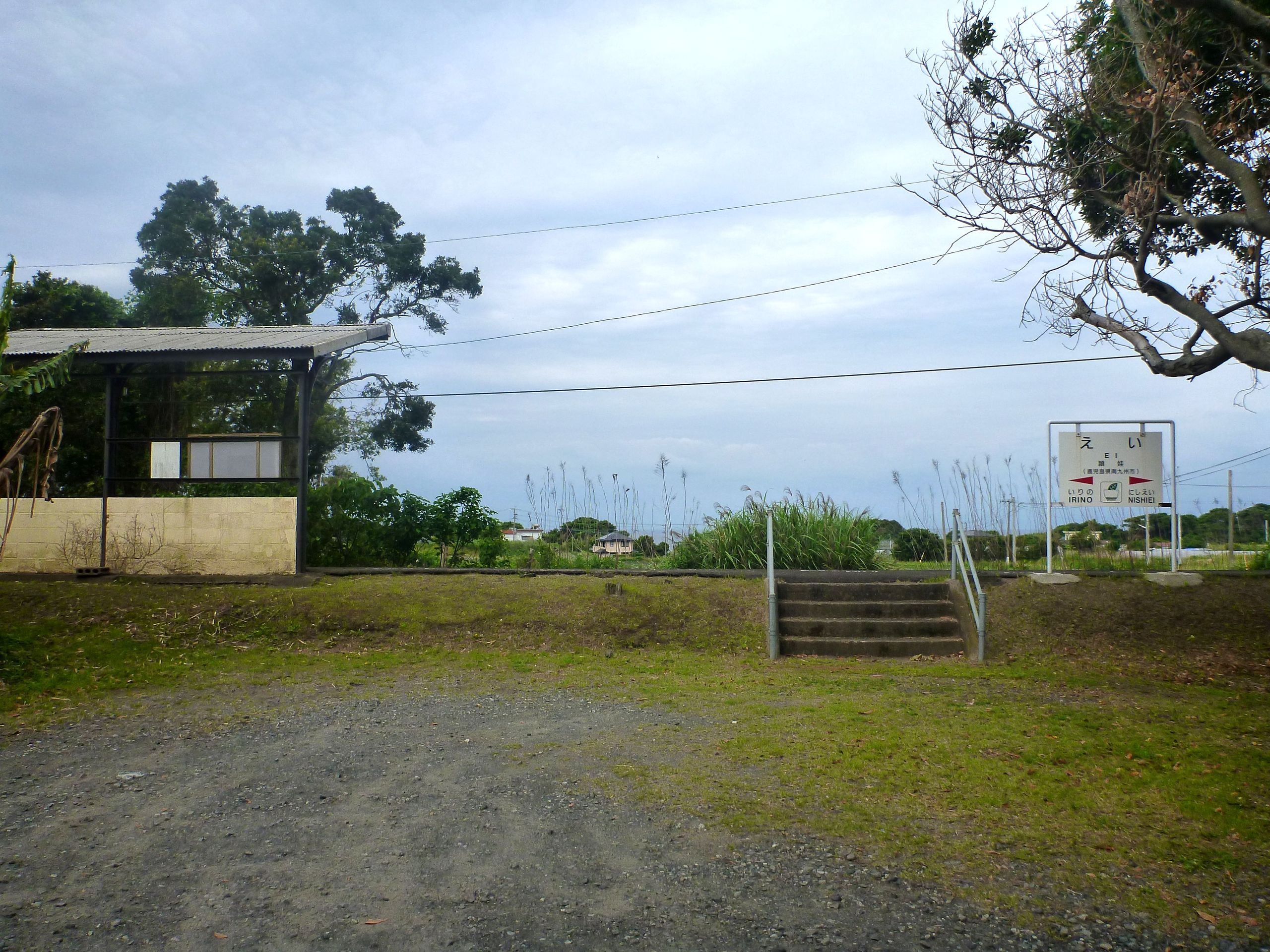 JR Ei Station